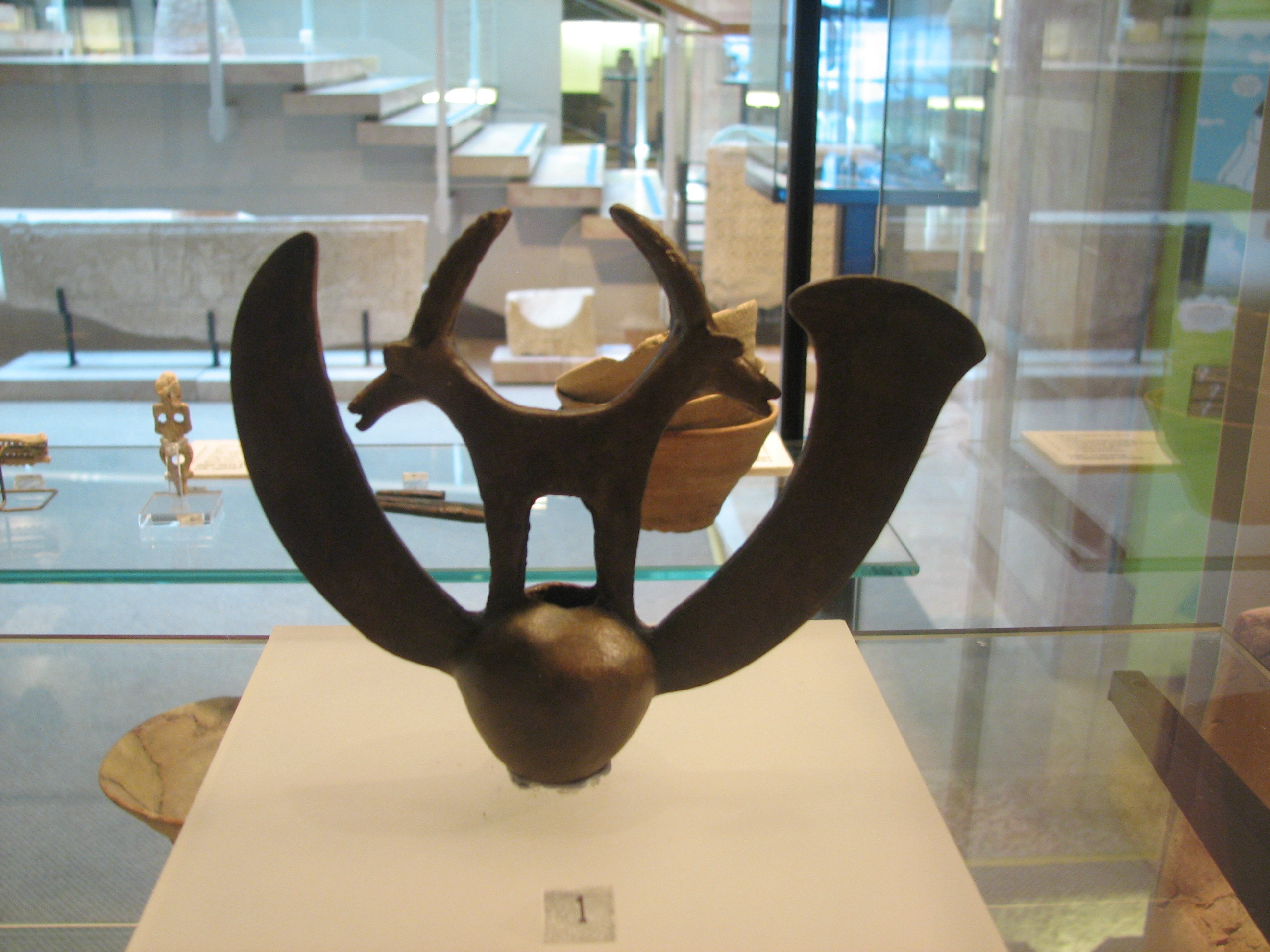 Treasure of Nahal Mishmar is a hoard of Chalcolithic artifacts discovered in a cave on the northern side of Nahal Mishmar. The hoard included 432 copper, bronze, ivory and stone decorated objects; 240 mace heads, about 100 scepters, 5 crowns, powder horns, tools and weapons מטמון נחל משמר התגלה בשנת 1961 במערה בנחל משמר במדבר יהודה בעקבות מבצע חיפוש של מגילות גנוזות. נמצאו ממצאים מהתקופה הכלקוליתית שכללו 442 חפצים, מהם 429 מנחושת, ובהם שרביטים וכלי שנהב, שישה חפצים מהמטיט, אחד מאבן, חמישה מניב של היפופוטם ואחד מחט של פיל. נס מעוטר מנחושת. העתק. תצוגה, מוזיאון הכט חיפה הנס מעוטר בתאומי יעלים בעלי גוף אחד. משני הצדדים שתי זרועות בצורת להבי סכין וגרזן